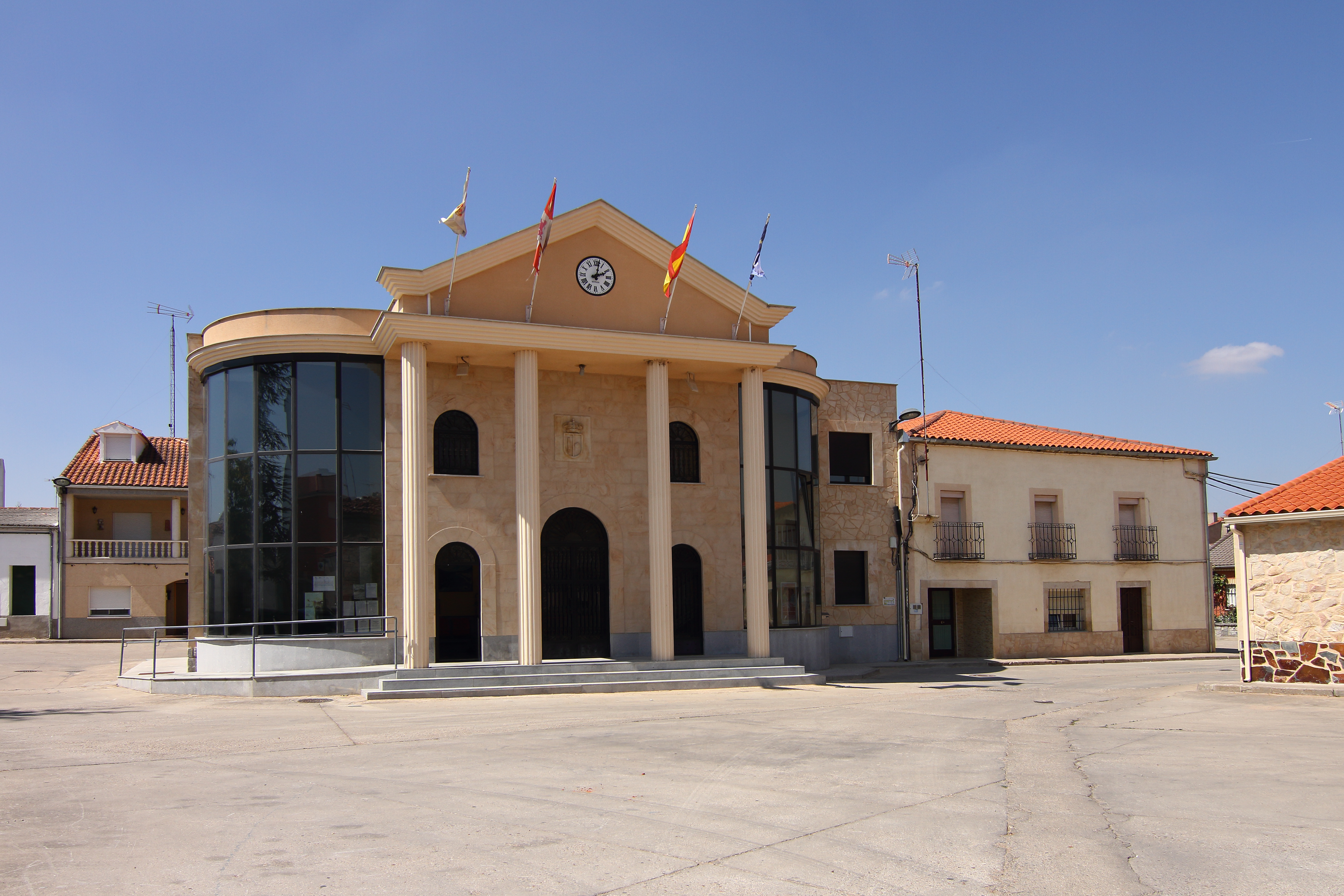 Ayuntamiento de Calzada de Valdunciel